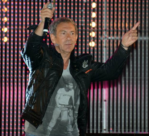 François Feldman au concert "La Folie des années 80" à Enghien-les-Bains